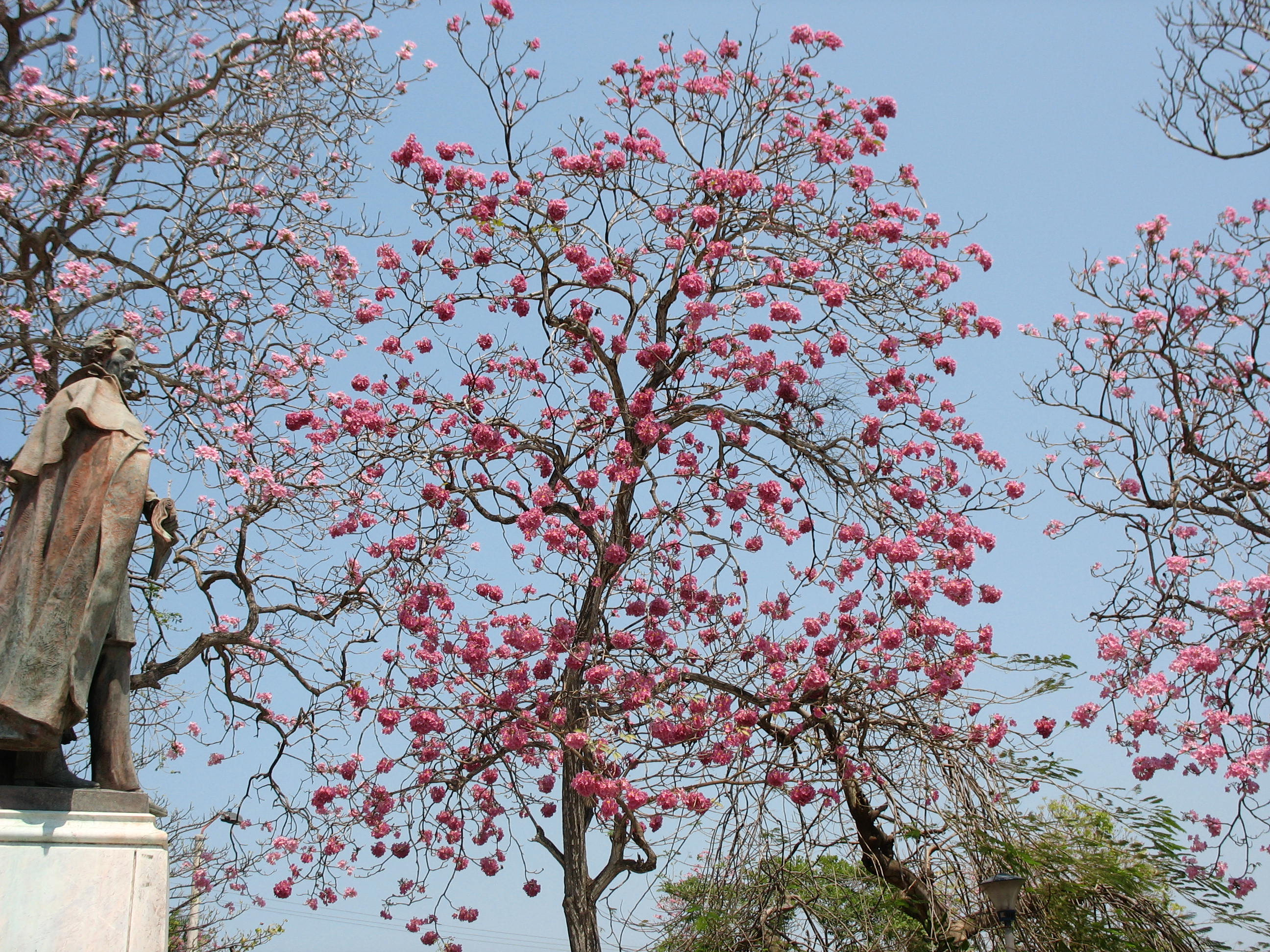 Robles morados, Parque Santander, Barranquilla, Colombia